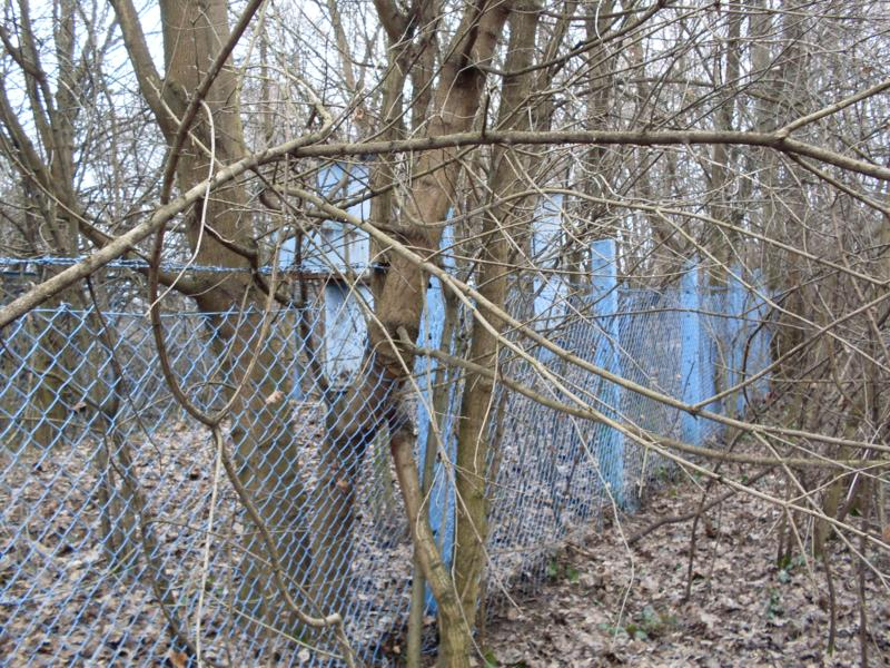 A Magyar Állami Földtudományi Intézet kútcsoportja (Erdőtelki Égerláp Természetvédelmi Terület, Heves megye)